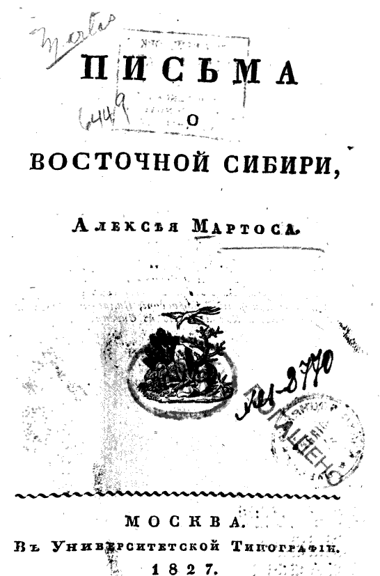 Обложка книги А. И. Мартоса "Письма о Восточной Сибири".